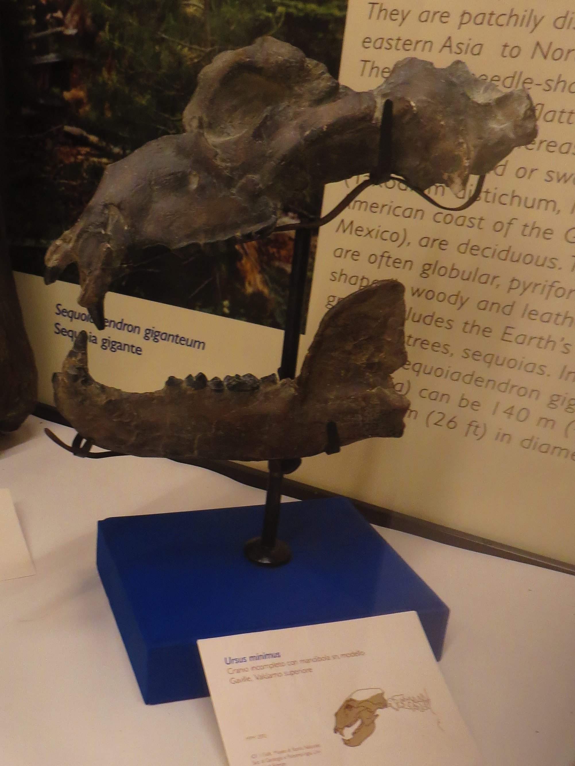 Fossil - Took the picture at Museo Paleontologico di Montevarchi